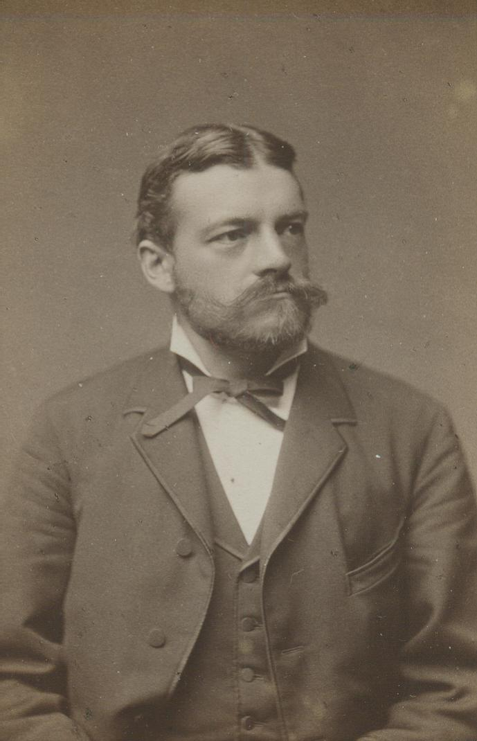 Porträtfotografie von Hermann (von) Tappeiner (1847–1927)